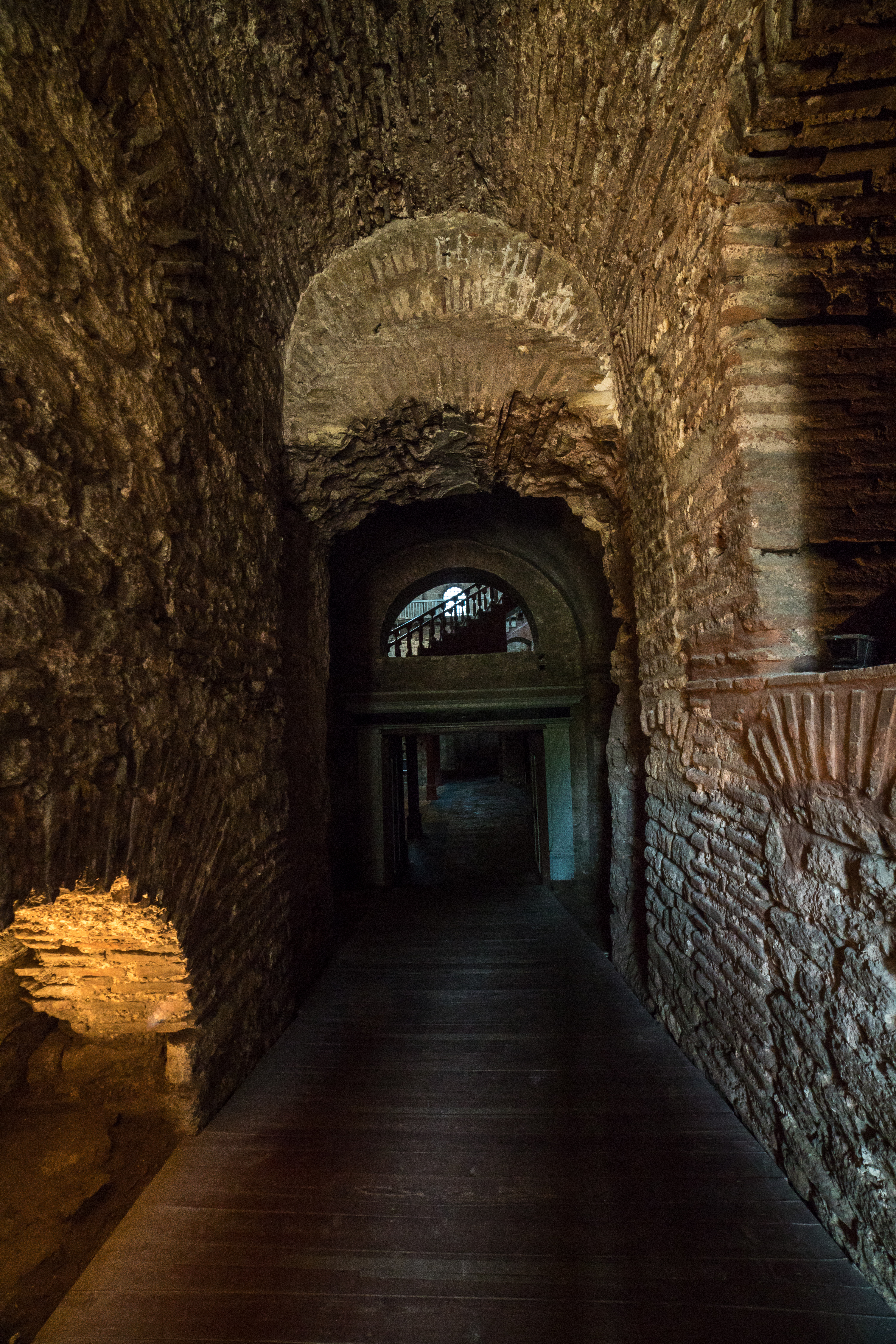 corridoio